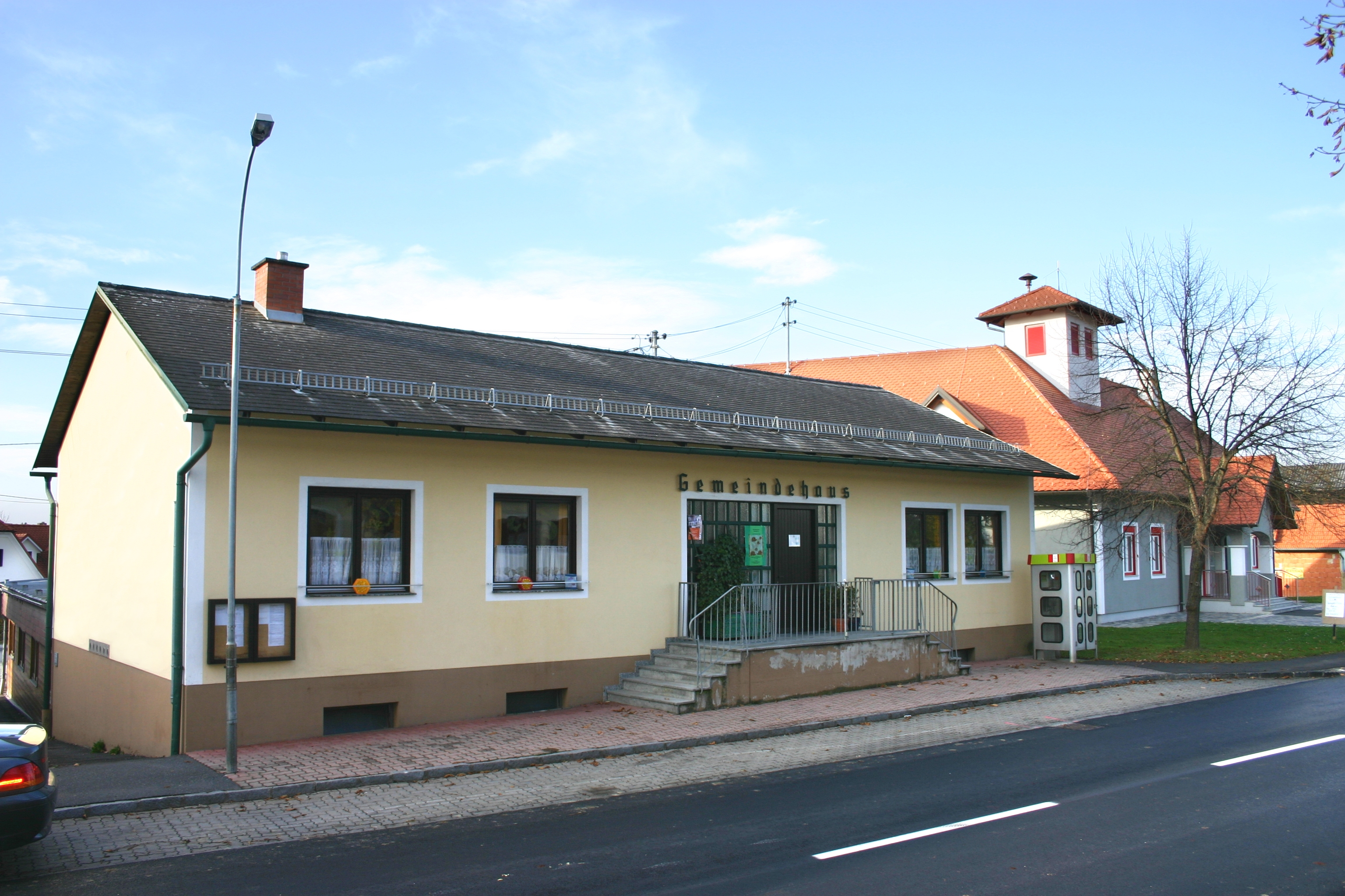 Deutsch Kaltenbrunn, ehemaliges Gemeindehaus, dann Kindergarten, dahinter Feuerwehrhaus im Ortsteil Rohrbrunn